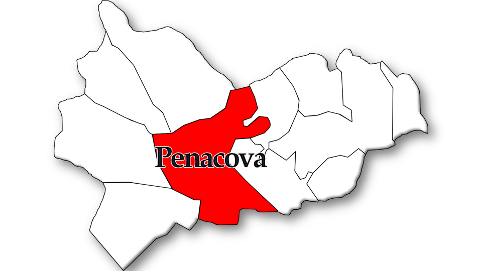 População